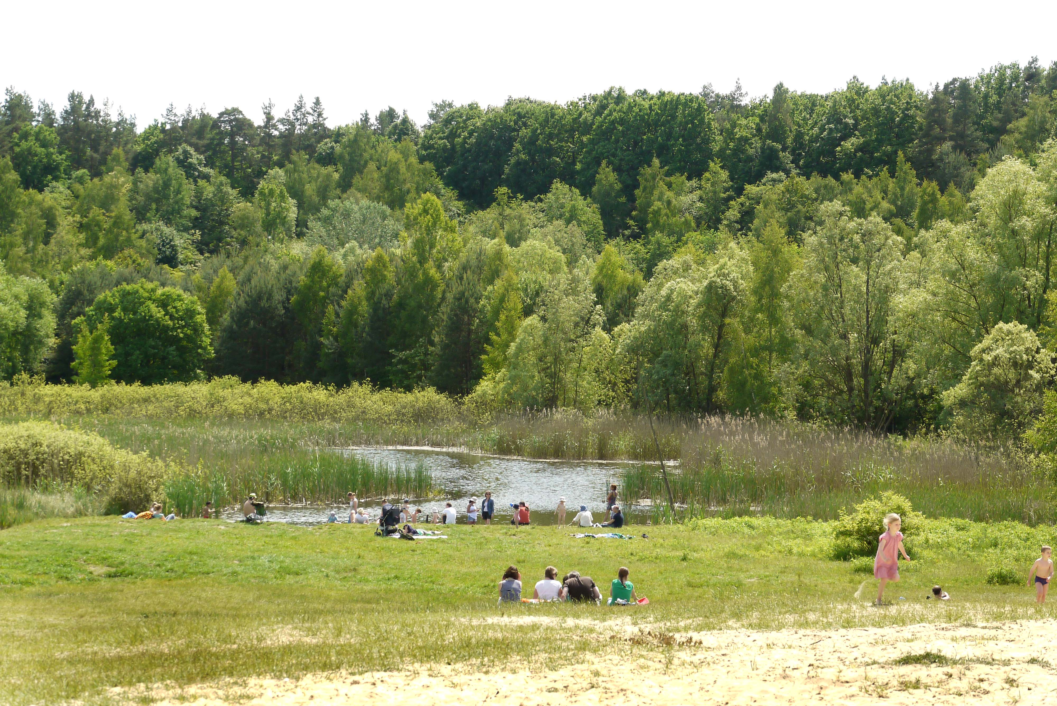 Blick auf die Wasserfläche im mittleren Teil des NSG „Sandgrube im Jagen 86“ des Berliner Grunewalds. Die Grube entstand durch Sandaushub und liegt bis zu 25 Meter unter dem Niveau des umgebenden Waldes. Da sie zum Teil unter dem Grundwasserspiegel liegt, finden sich neben dem Feinsand (im Vordergrund) und Bäumen auch Wasserflächen und Feuchtgebiete.